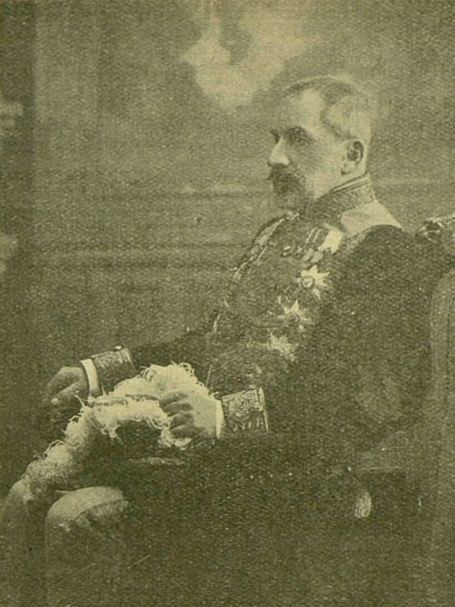 Герман Августович фон-Тобизен, русский государственный деятель, сенатор.